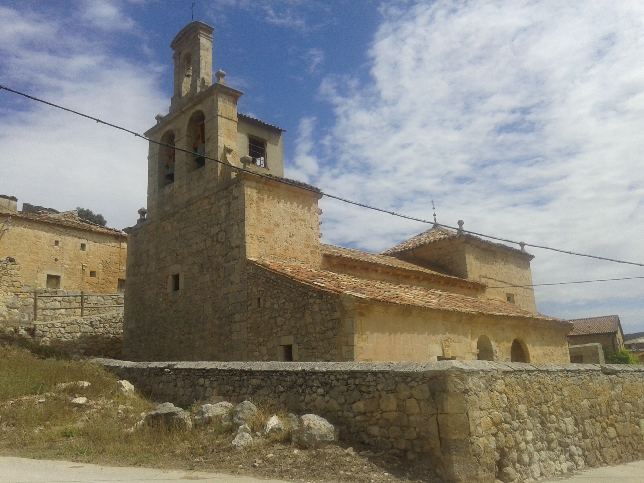 Vista frontal Iglesia de Nuestra Señora de la Asunción